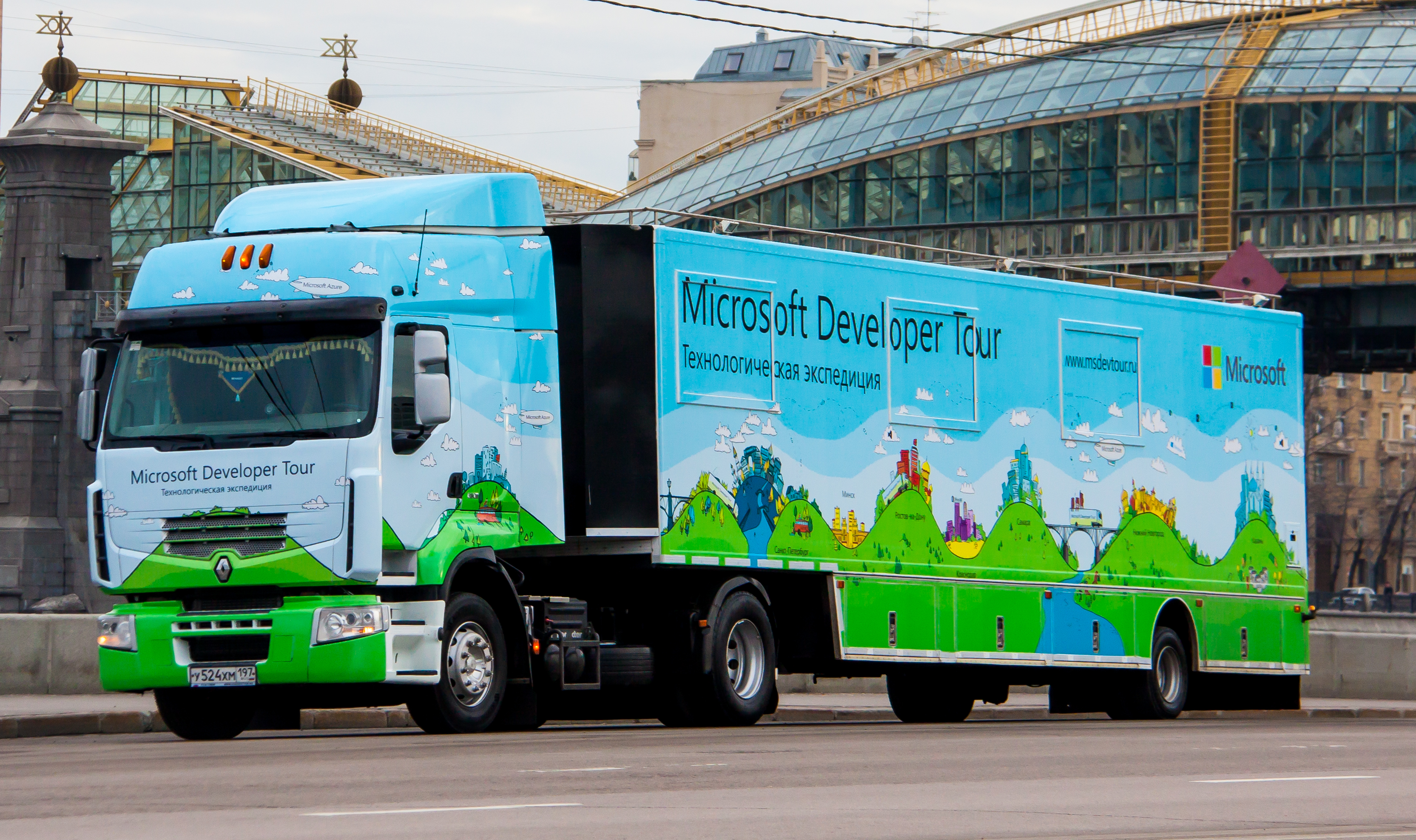 Гримерно-костюмерный автокомплекс, роад-шоу, Microsoft, BTL-акция